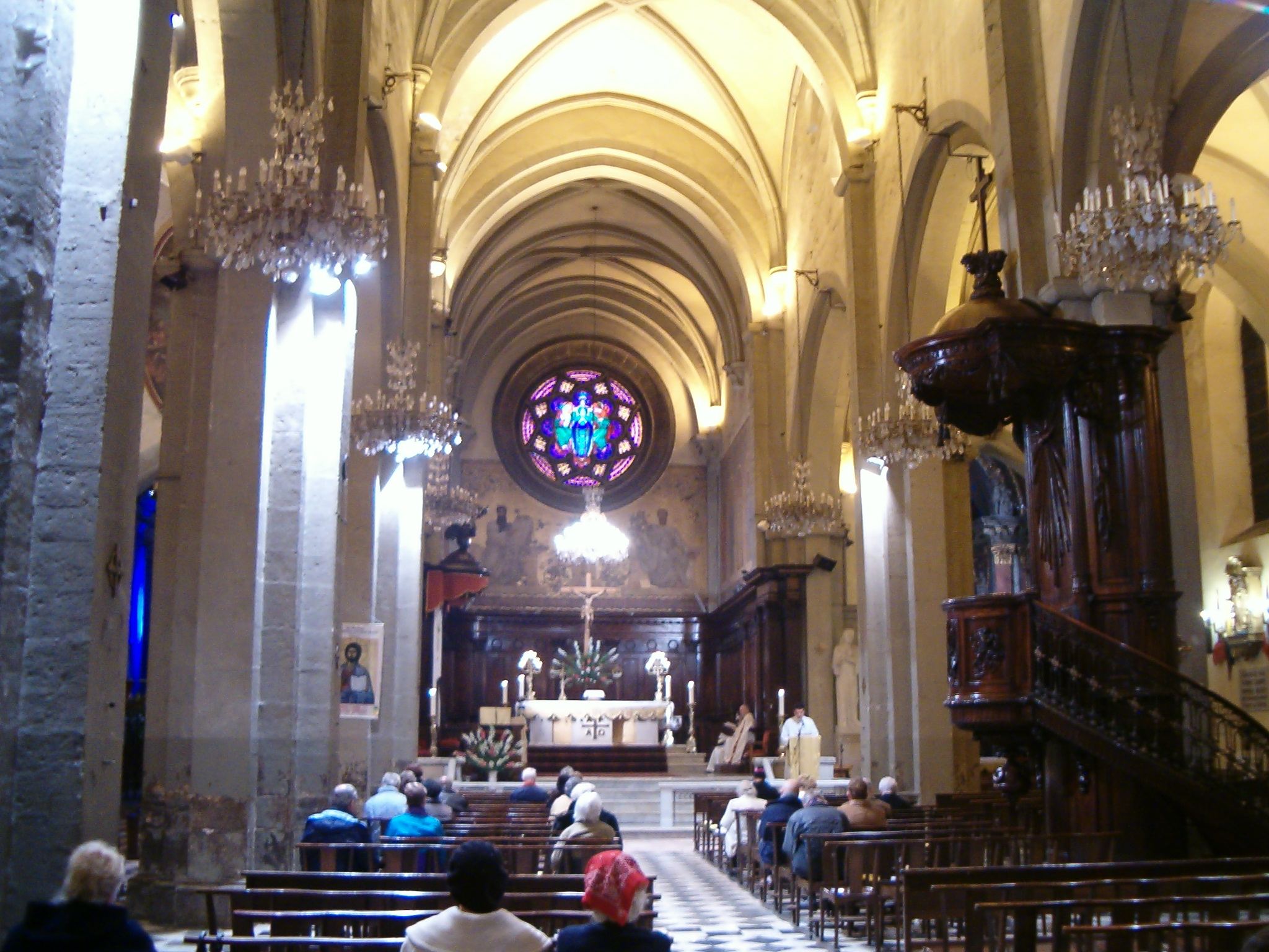 Nef de la Cathédrale de Toulon. Décembre 2006.